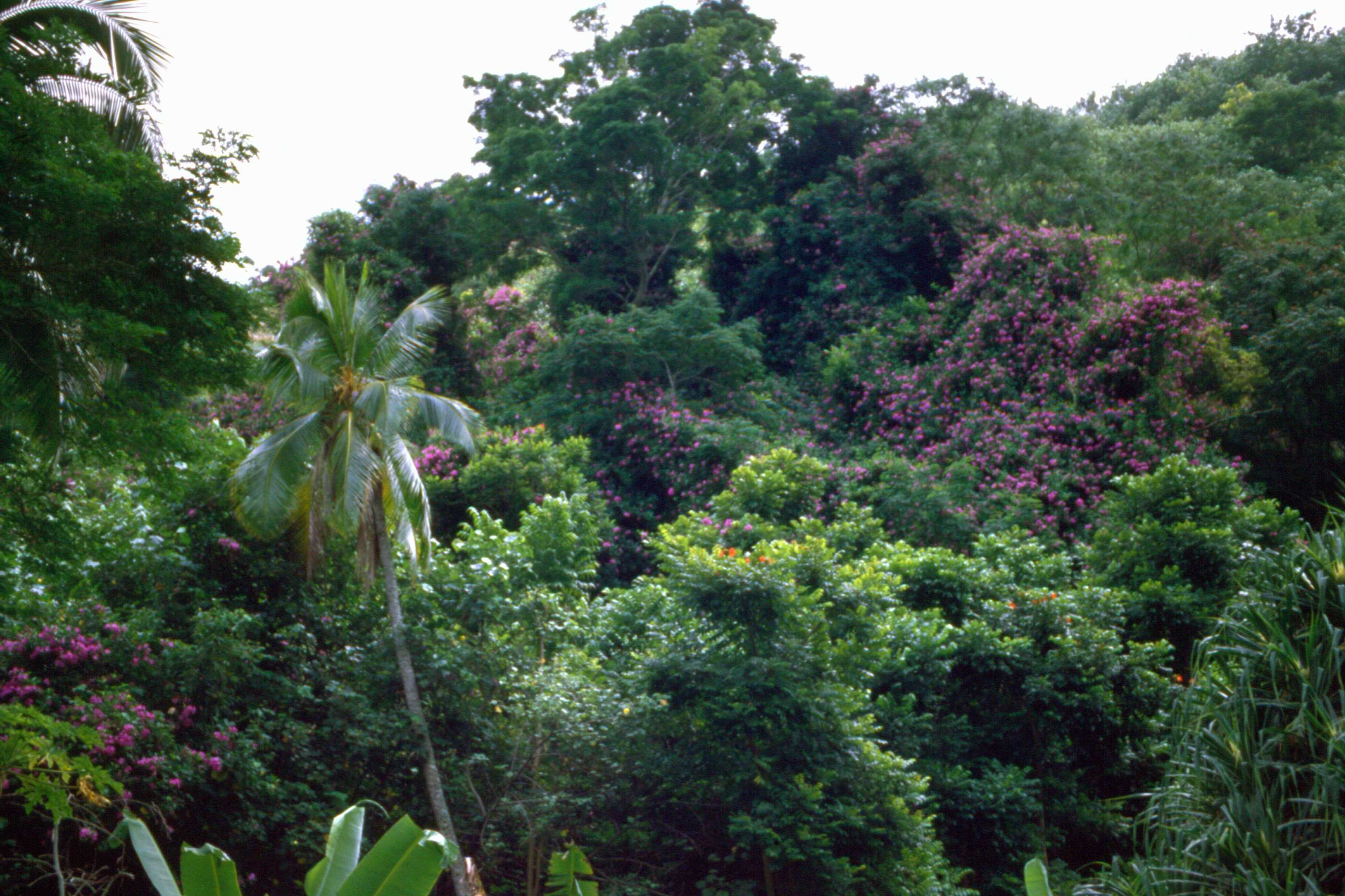 Vegetation im Inselinneren von Tahiti, Französisch-Polynesien